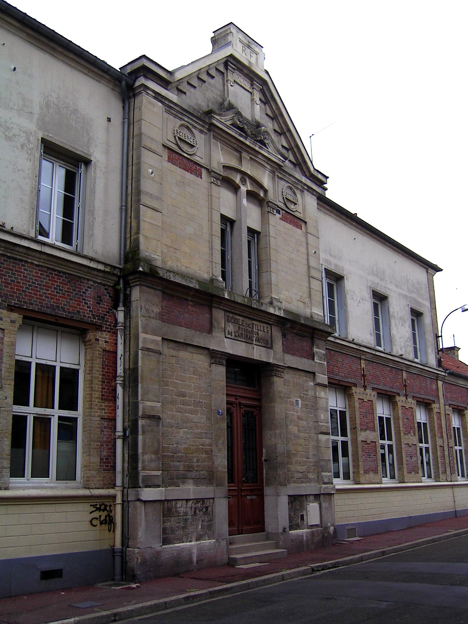 Livry-Gargan (France) - L'école Jacob - Décembre 2006 Photo personnelle (own work) de Marianna